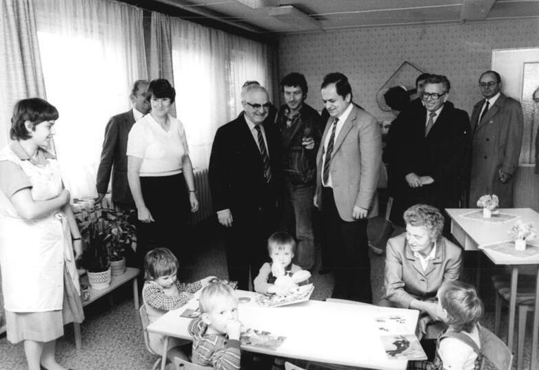 Ungarische Parlamentarier in einem Kindergarten ADN-ZB Pätzold-31.10.84-kb Bez. Schwerin: UVR-Parlamentarier- Die zu einem offiziellen Freundschaftsbesuch in der DDR weilende Delegation der Landesversammlung der UVR unter Leitung ihres Präsidenten, Antal Apro (4.v.l.), Mitglied des ZK der USAP, war Gast im Kindergarten der Gemeinde Plate nach der Bezirksstadt Schwerin.